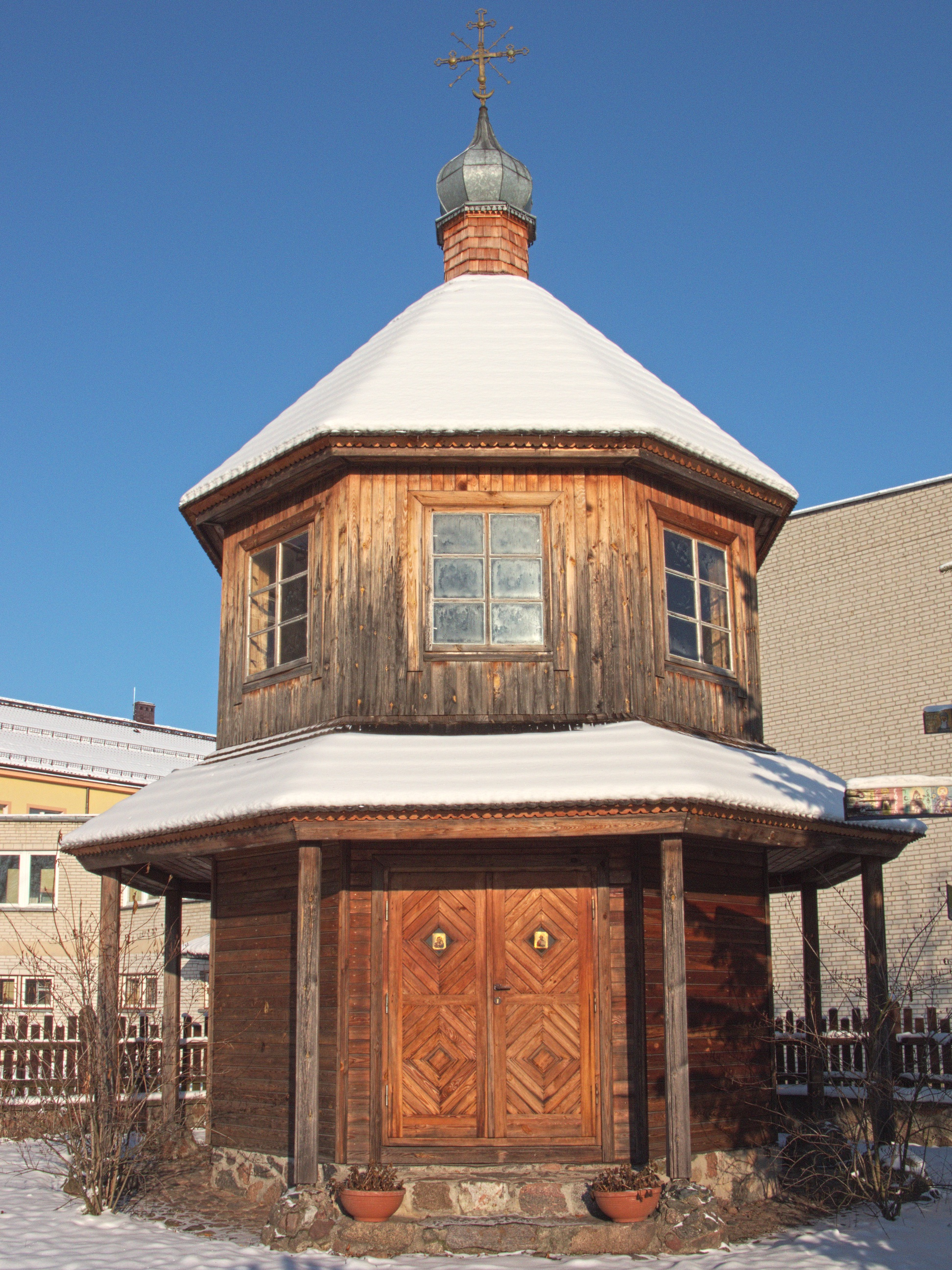 Kaplica św. Mikołaja w Bielsku Podlaskim.